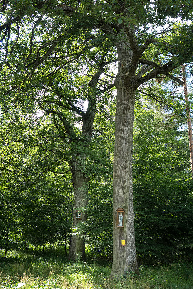 An dieser wunderschönen Waldstelle nahe dem Güterweg befinden sich eigentlich 2 Eichen mit jeweils einem Bildstock. Die Legende sagt, dass hier auf einer Eiche während der schwedischen Besatzung im 30-jährigen Krieg ein in Ungnade gefallener schwedischer Soldat bzw. ein Mitglied einer einheimischen Grafenfamilie ein sicheres Versteck gefunden habe. Später hat dieser aus Dank ein silbernes Amulett in die Eiche gehängt bzw. silberne Geschoßkugel in den Stamm geschossen. This media shows the natural monument in Lower Austria with the ID KR-010.